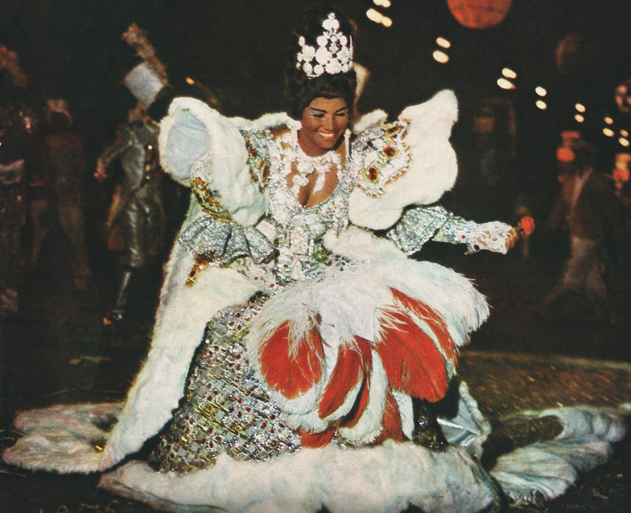 Destaque do Salgueiro, Carnaval do Rio de Janeiro, 1966 (photo Geraldo Viola)